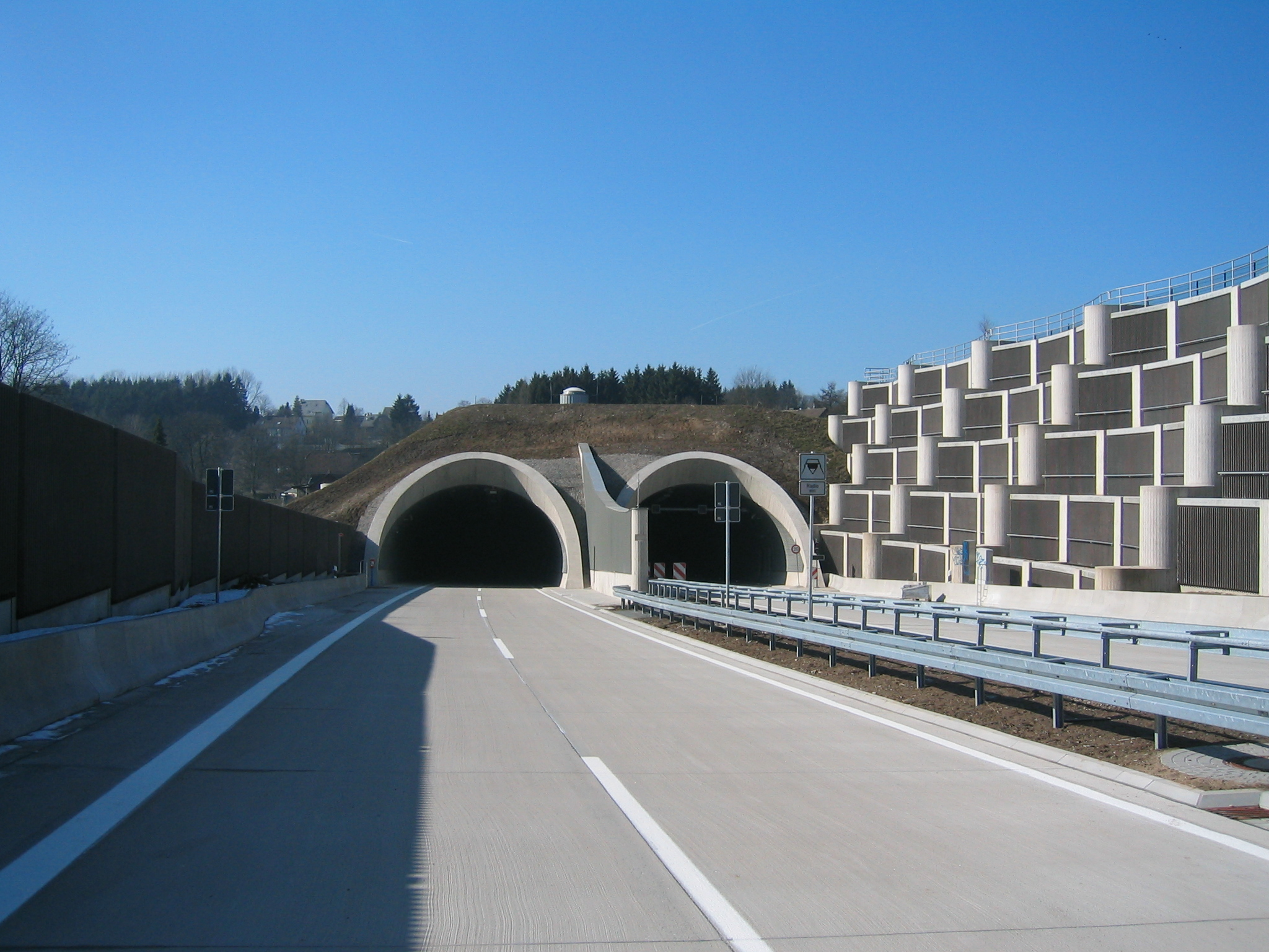 Burgholztunnel in Wuppertal. Ostportal. Einfahrt. Blickrichtung Talwärts/Bergab. Cronenberg - Sonnborn (Foto: 1 1/2 Wochen vor Eröffnung).